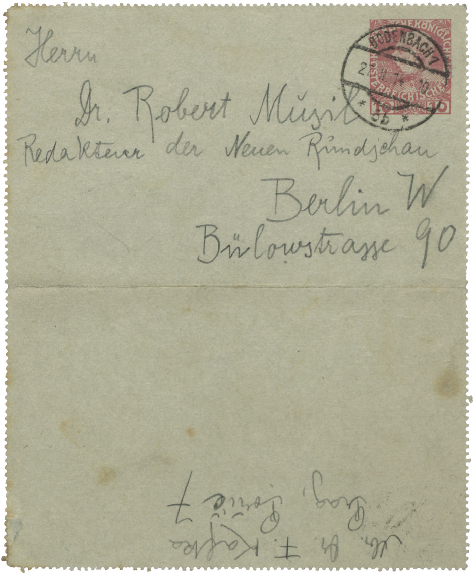 Umschlag zu einem Brief von Franz Kafka an Robert Musil, 27. Februar 1914; im Brief geht es um den Abdruck von Kafkas Erzählung "Die Verwandlung": "... nur in aller Kürze von einer kleinen aber sehr zerstreuenden und unruhig machenden Reise: Sehr schade, dass die ersten Briefe, die wir wechseln, Ihnen so kleinliche Schwierigkeiten bereiten müssen ... Machen Sie verehrter Herr Doktor mit der Geschichte, was Sie wollen und was Ihnen nicht Mühe bereitet - es wird das Richtige sein. Die Mitteilungen über Ihre Pläne, die Sie mir in Aussicht stellen, erwarte ich mit Freude ..." (der unedierte Brief leider im Katalog nicht abgebildet)